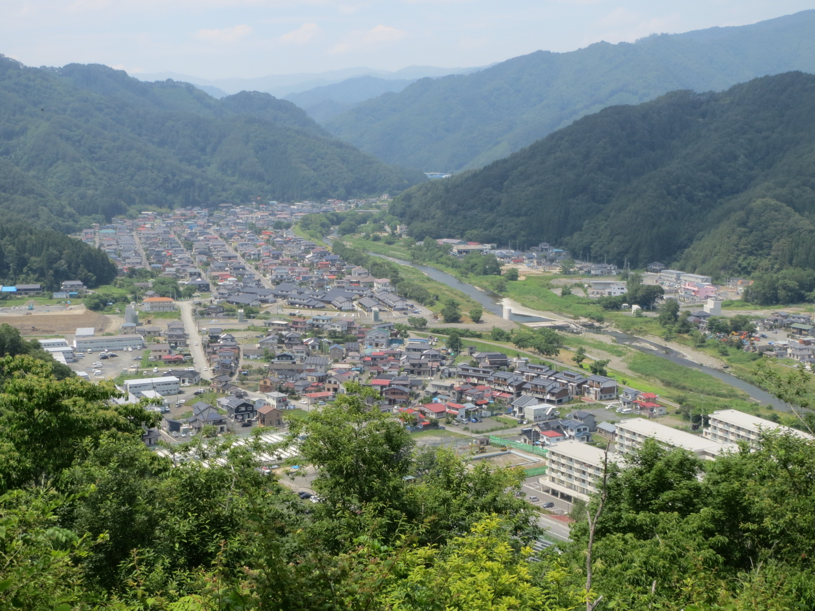 大槌城山公園から臨む源水・大ヶ口